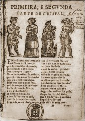 Página de edição antiga (sec. XVI?) de Crisfal, um poema de Cristovao Falcao